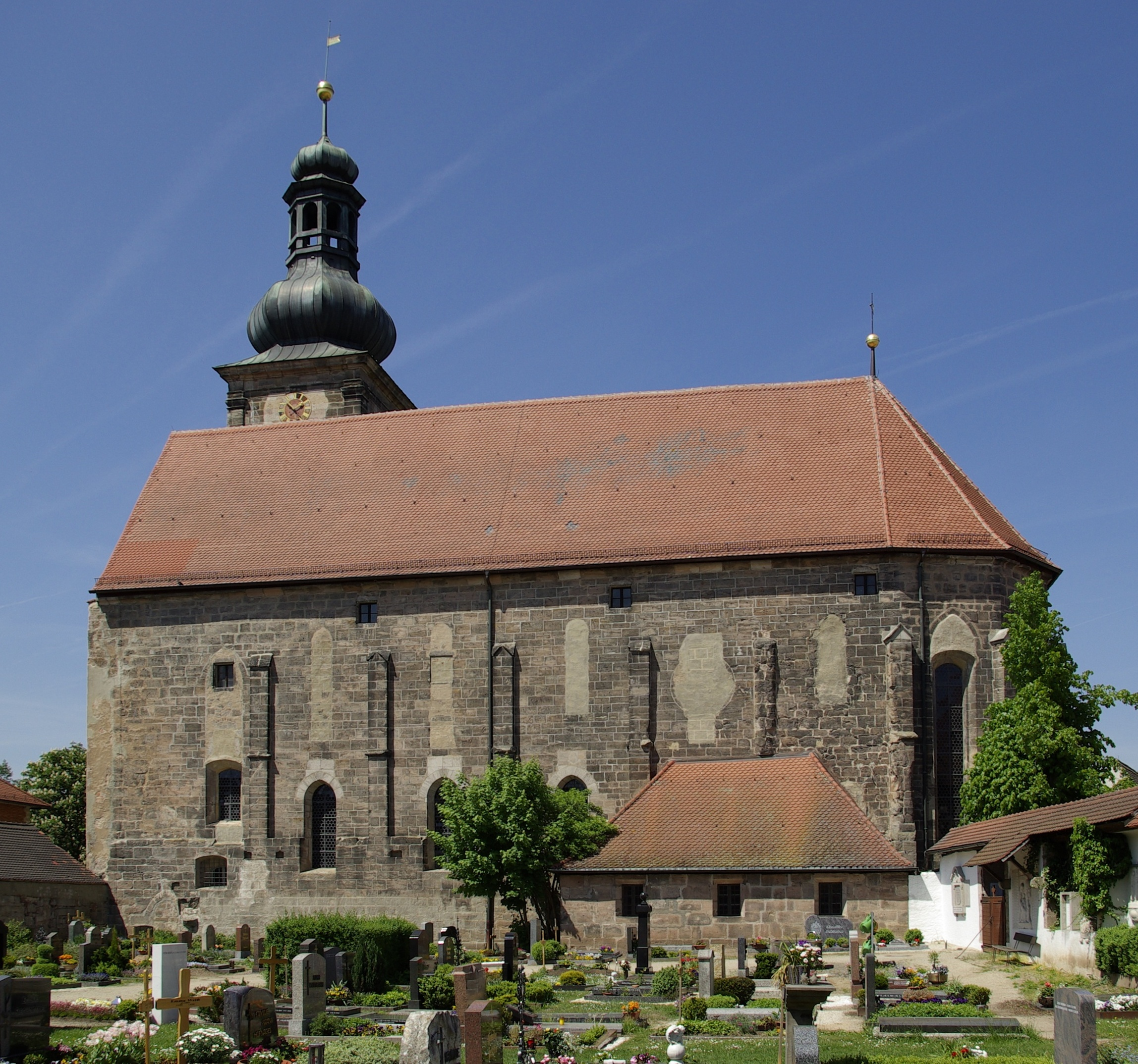 Ehemalige Klosterkirche Frauenaurach (heute St. Matthäus) im Erlanger Stadtteil Frauenaurach